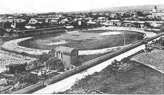 Vélodrome du Stade Bonnaud en 1906 à Pertuis (Vaucluse)